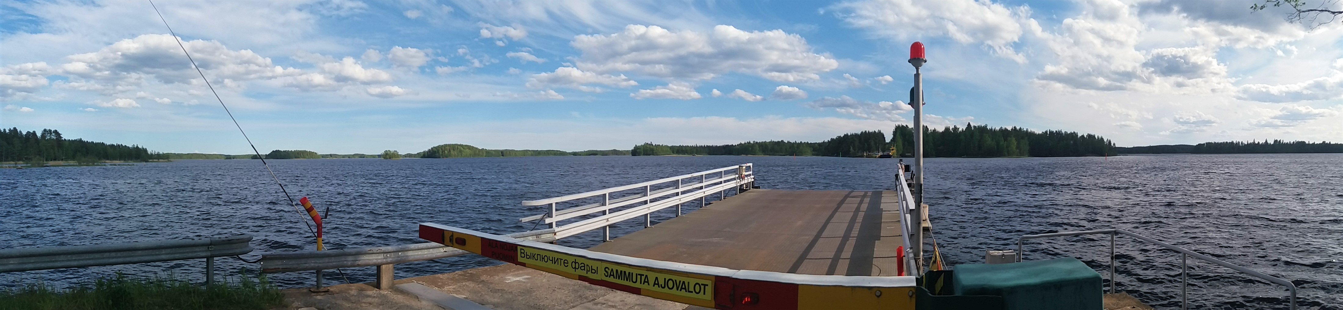 Tappuvirtaa Varkauden puoleiselta rannalta.